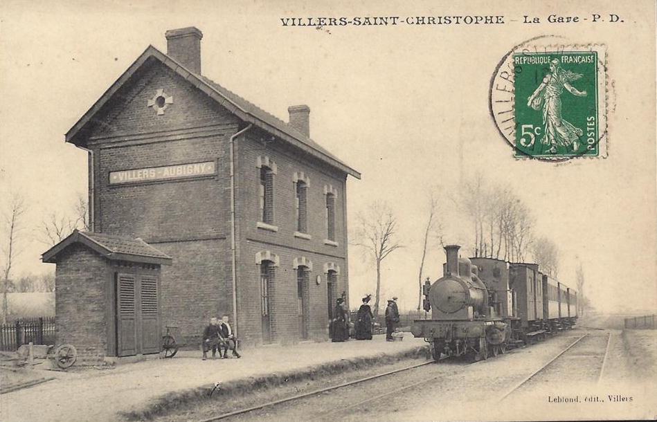 La halte de Villers-Aubigny vers 1910